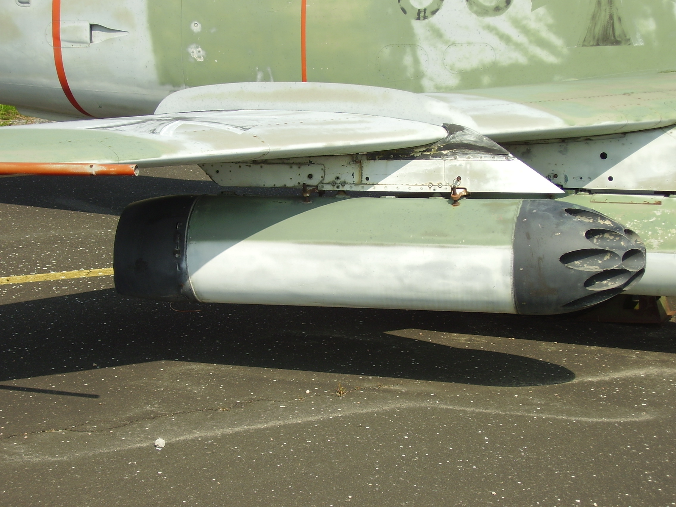 Luftwaffenmuseum der Bundeswehr; Airforce Museum of the Bundeswehr; Berlin-Gatow, Fiat G.91 R.4